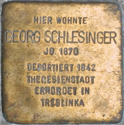 Stolperstein Cottbus, Bahnhofstraße